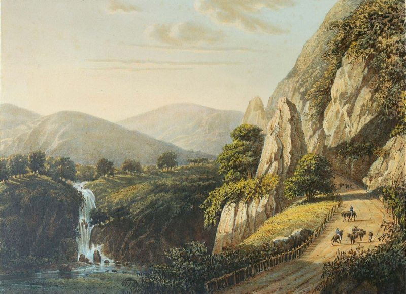 Litho. Litho naar een oorspronkelijk schilderij van A. Salm.. Een berglandschap met een waterval en rotsen in Sumedang